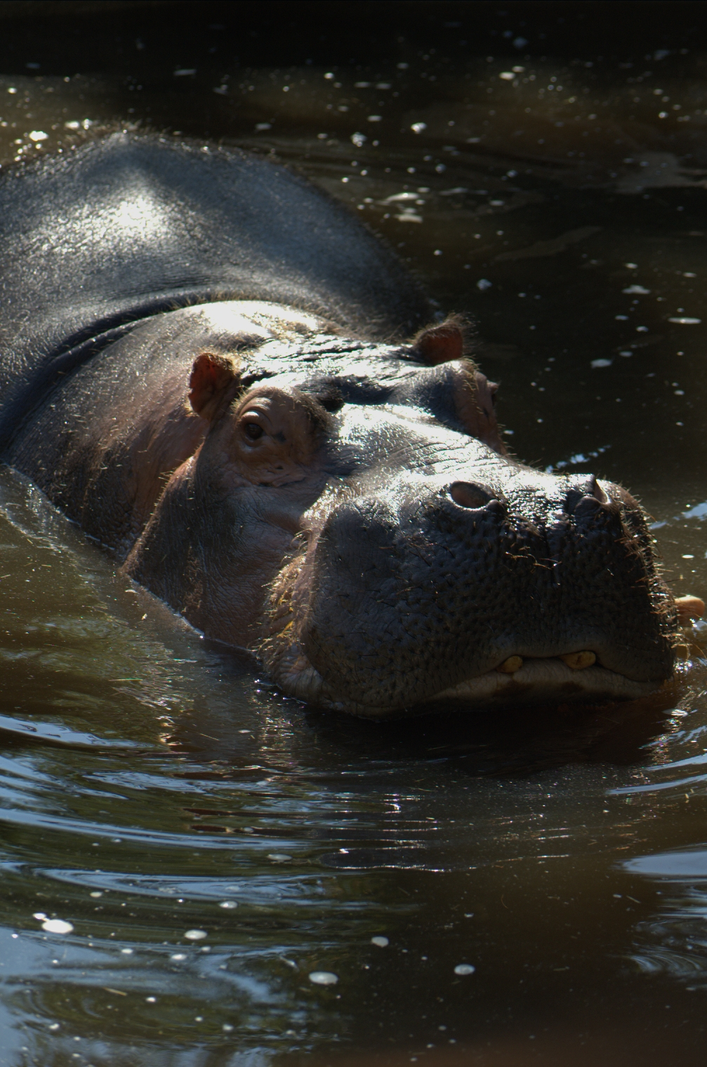 Hippopotame gueule ouverte Photo JM Demimieux